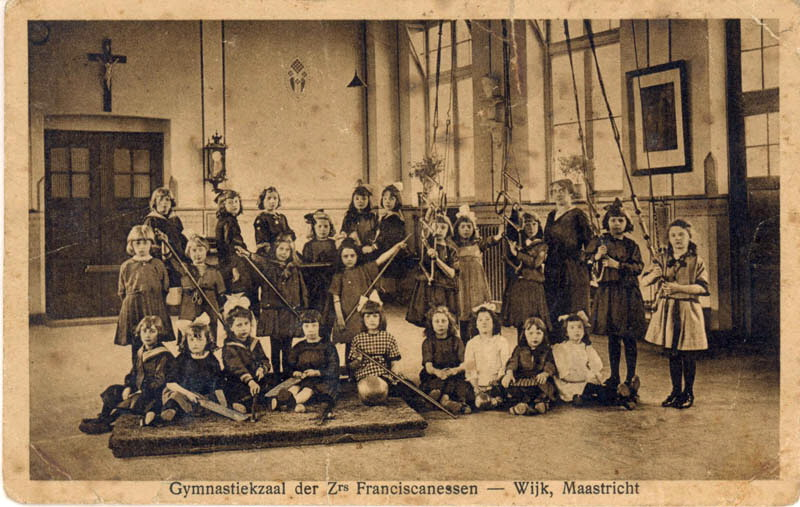 Meisjesschool van de zusters Franciscanessen van Heythuizen aan de Franciscus Romanusweg in Wyck-Maastricht in de jaren 1920. In het begin van de twintigste eeuw had de school al een gymnastiekzaal, terwijl het vak pas in 1941 verplicht werd. Een gymnastiekjuffrouw had de leiding. Het kloosterkleed van de zusters, habijt en kap, maakte het hen immers moeilijk zelf les te geven op de springmat en aan de ringen. Fotocollectie RHCL Maastricht, GAM 14998.